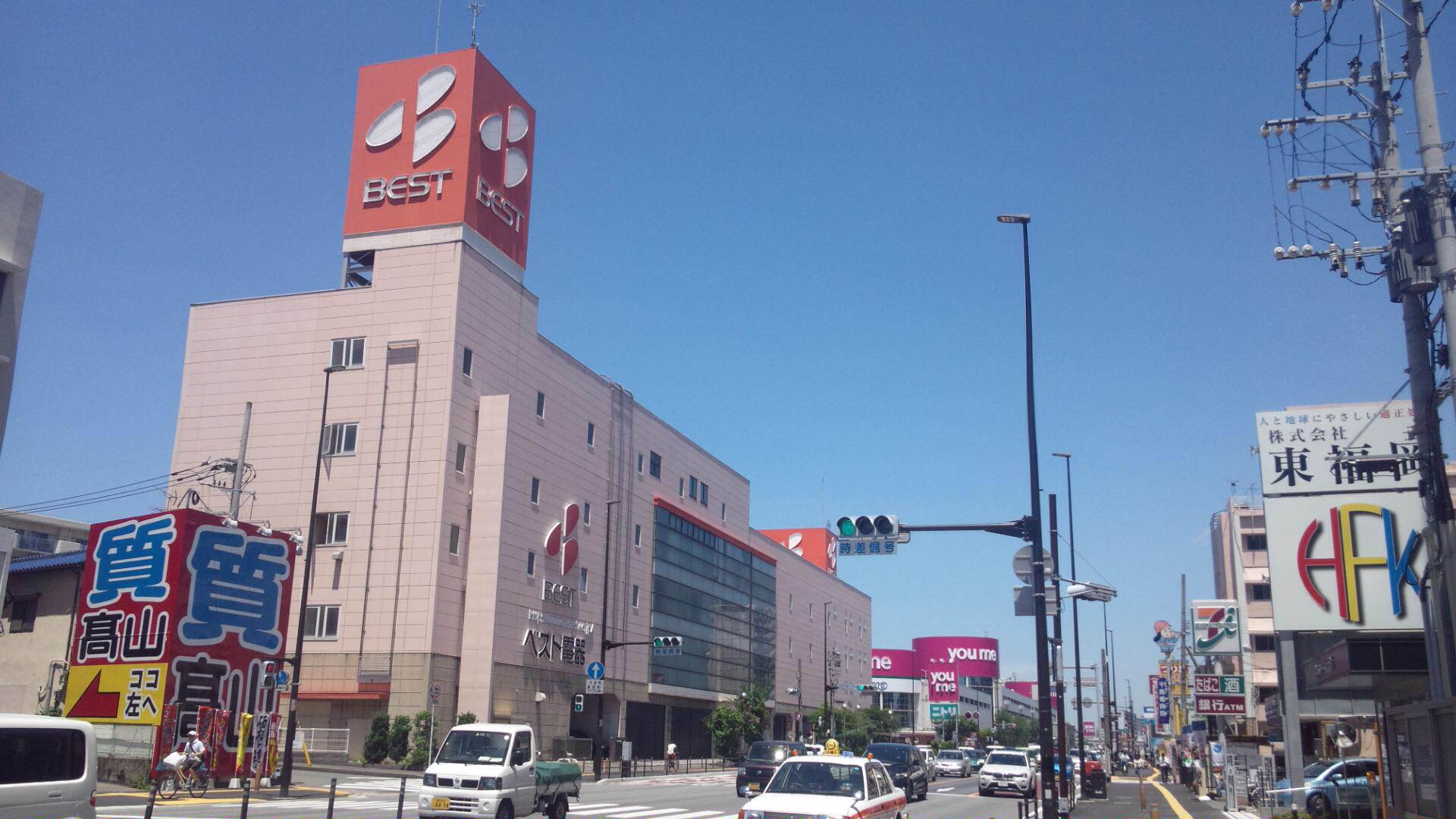 ベスト電器本社（福岡市博多区千代・旧ベスト電器東浜店）